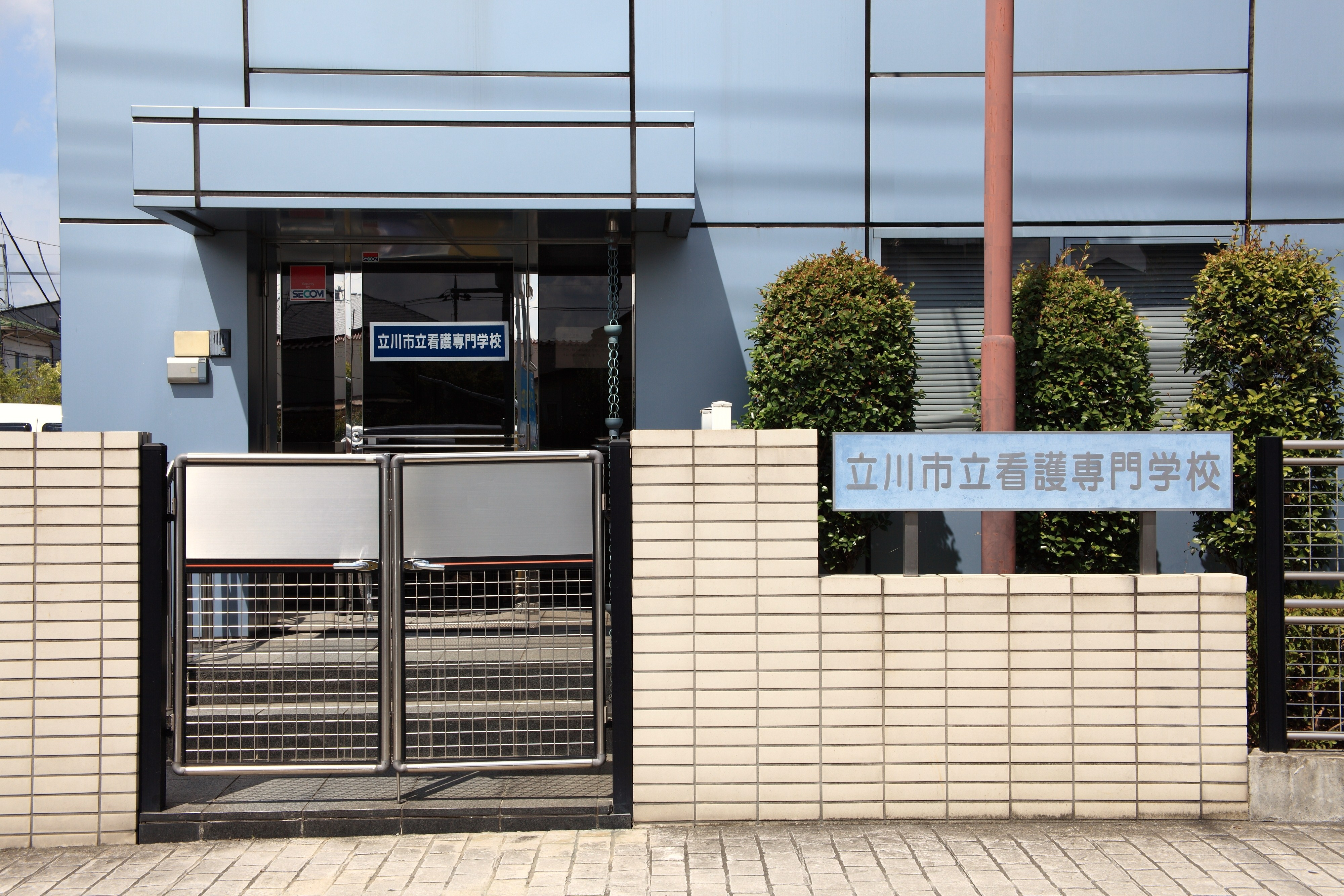 立川市立看護専門学校 入口